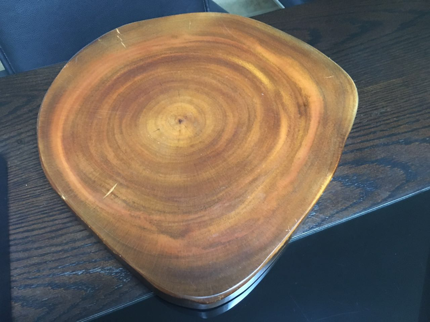 bolacha de cedro australiano comacabamento; corte de sete anos de idade